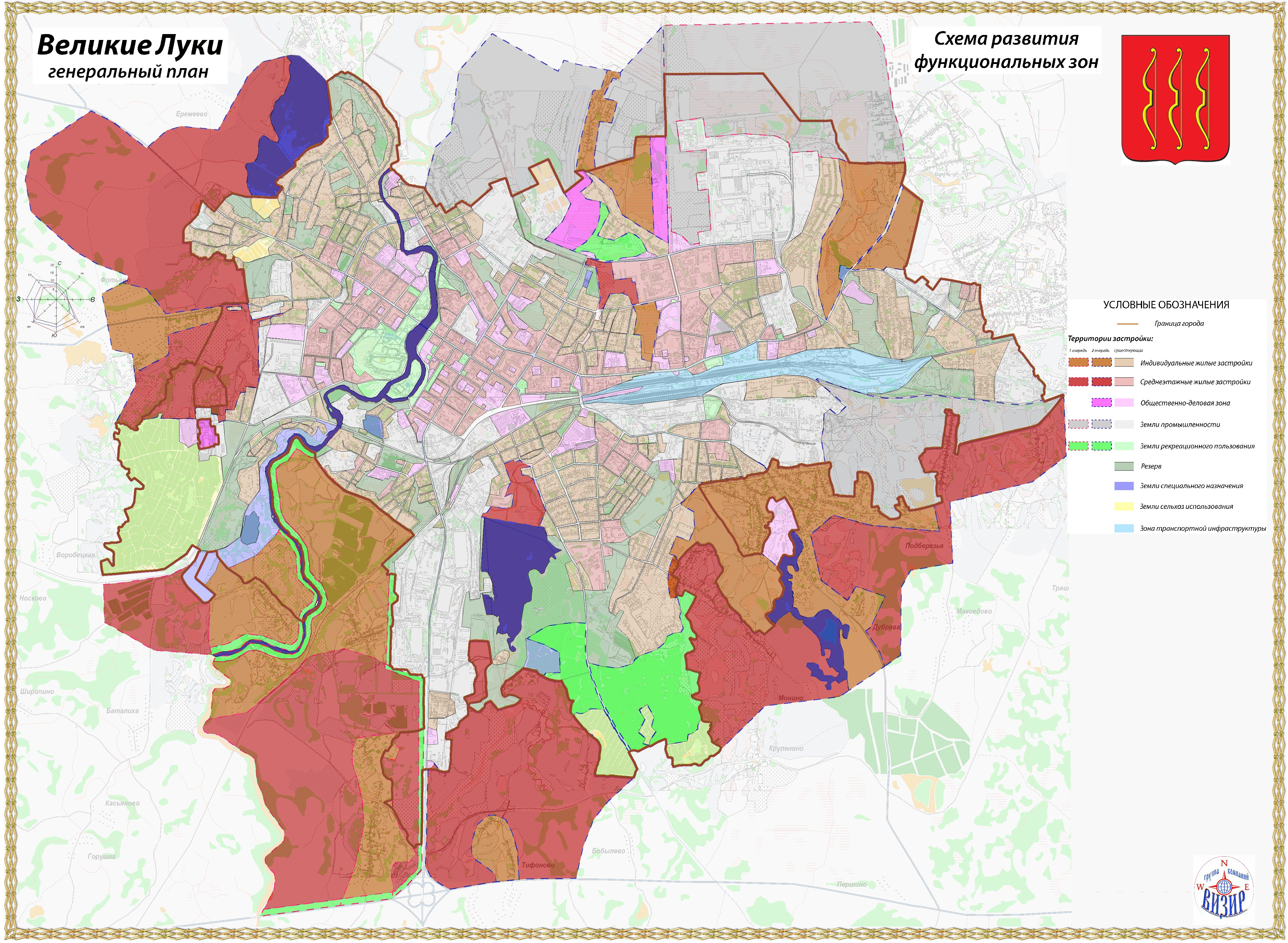 Официально принятый документ (Статья ГК 1264. п. 2): Генеральный план муниципального образования «Город Великие Луки» (основной чертеж), утвержденный решением Великолукской городской Думы от 20.04.2010 № 25.